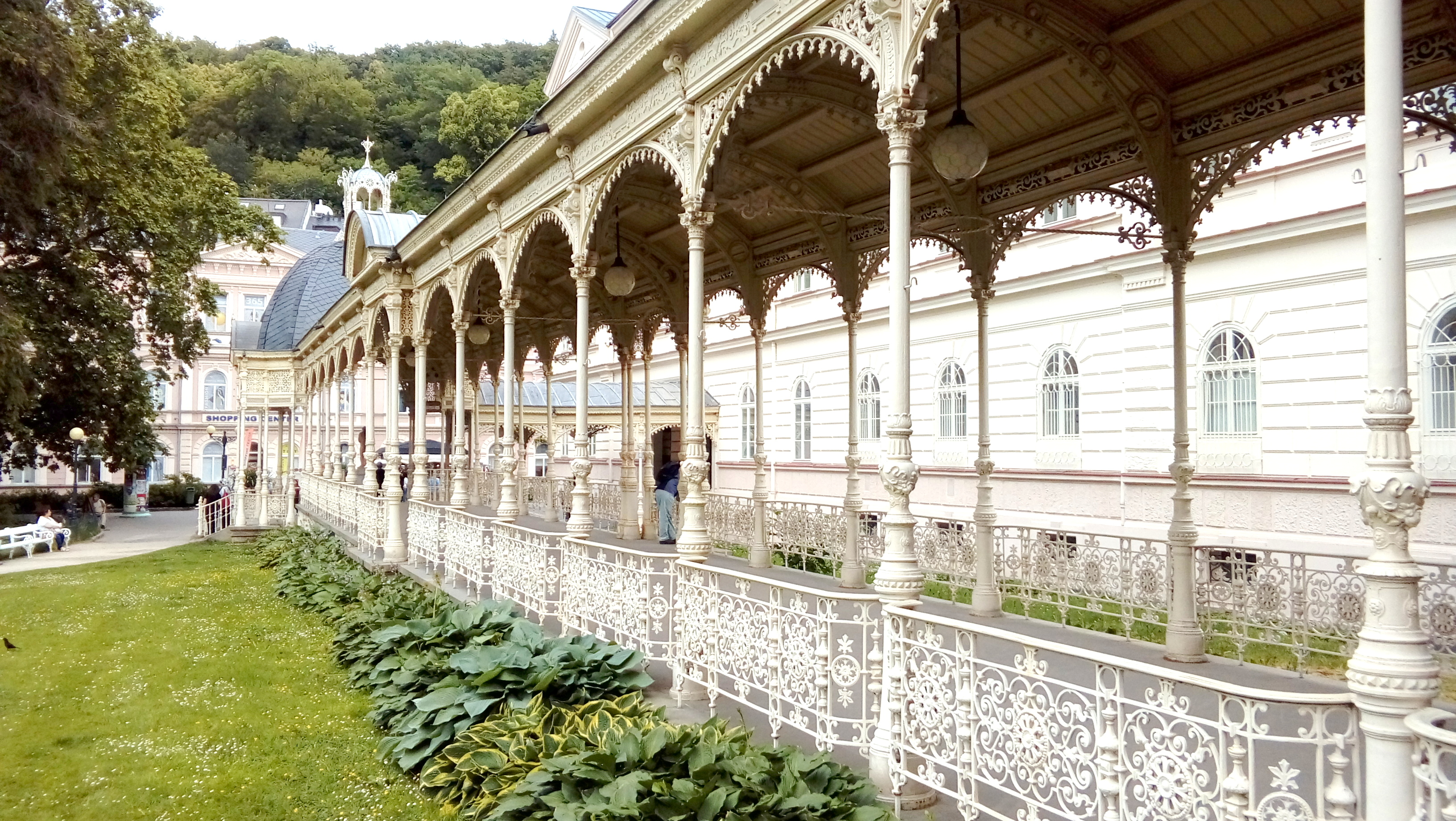 Karlovy Vary - Sadová kolonáda